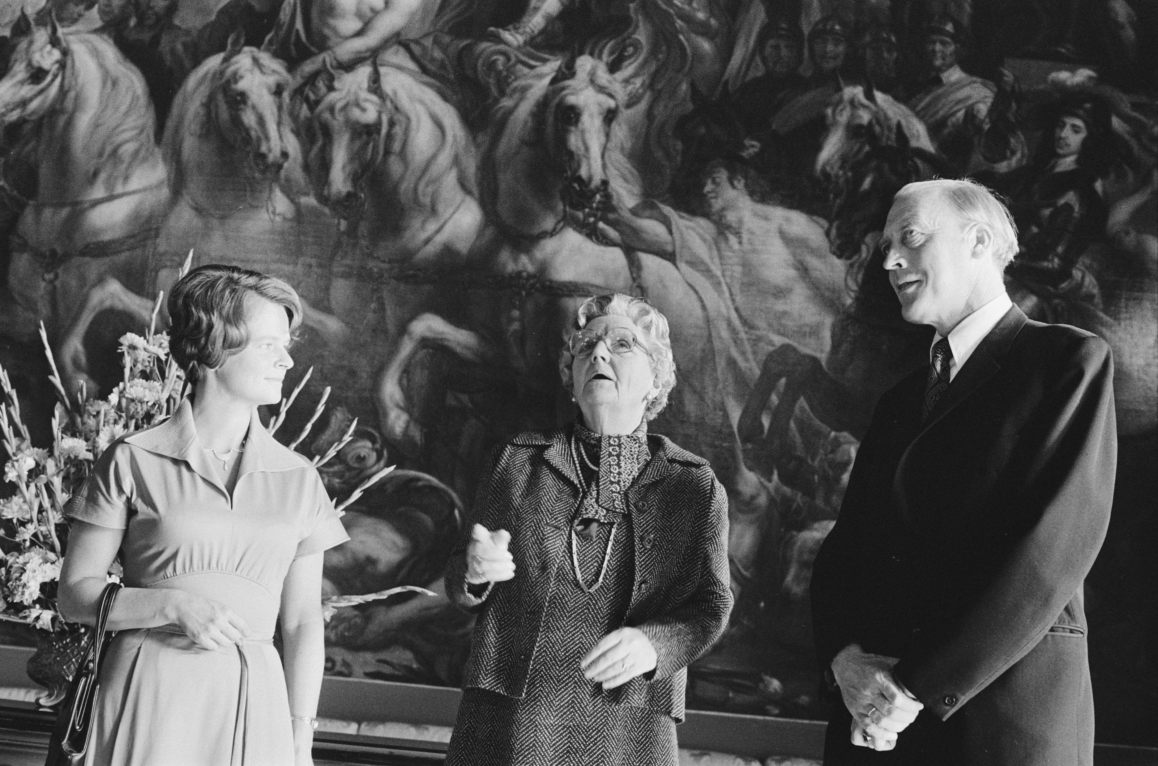 Collectie / Archief : Fotocollectie Anefo Reportage / Serie : [ onbekend ] Beschrijving : koningin Juliana ontvangt Noorse premier Nordli en minister Brundtland (links) op Huis ten Bosch Datum : 11 oktober 1976 Trefwoorden : koninginnen, ontvangsten, premiers Persoonsnaam : Juliana (koningin Nederland), Nordli, Odvar Fotograaf : Verhoeff, Bert / Anefo Auteursrechthebbende : Nationaal Archief Materiaalsoort : Negatief (zwart/wit) Nummer archiefinventaris : bekijk toegang 2.24.01.05 Bestanddeelnummer : 928-8235